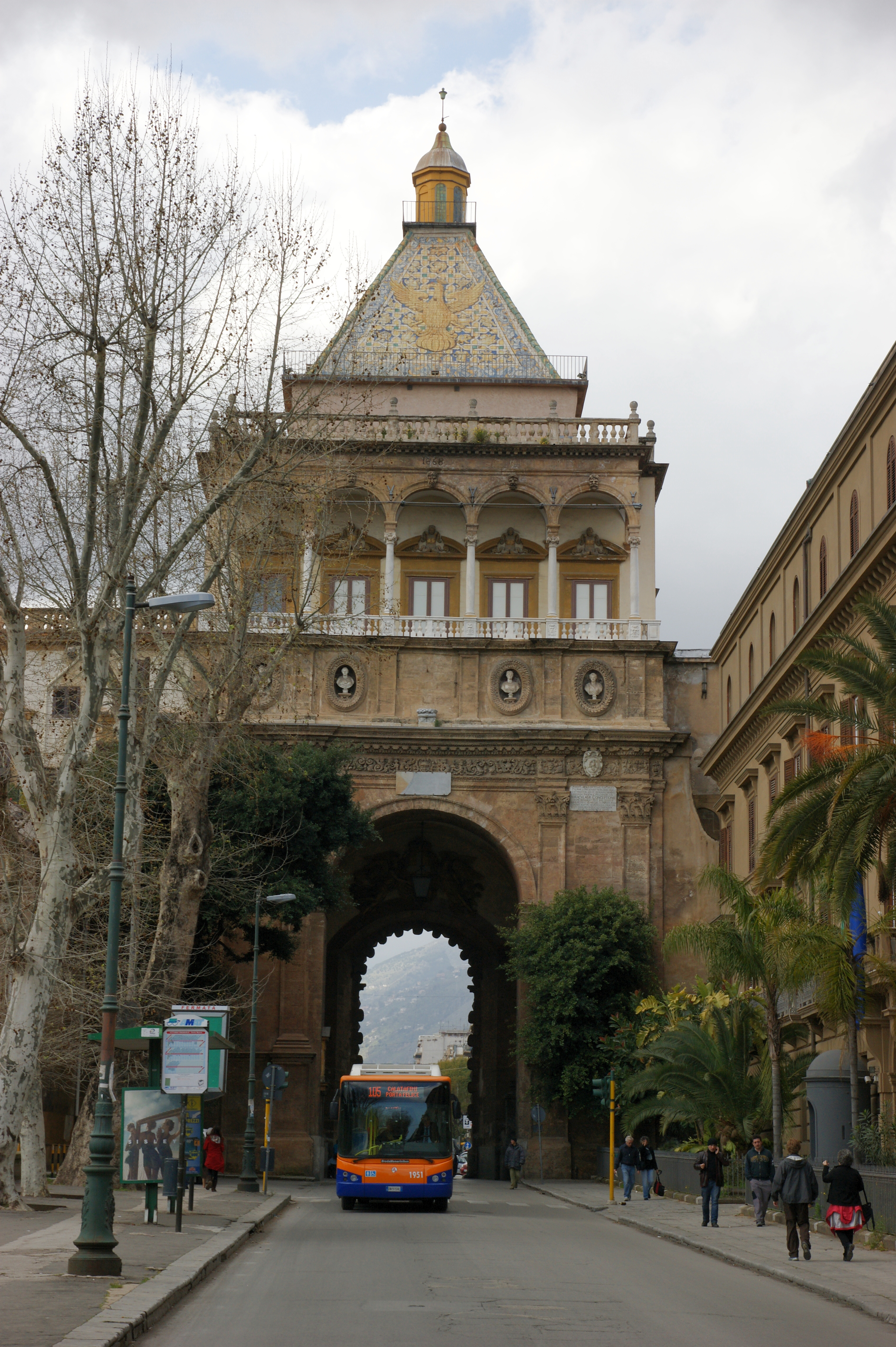 Porta Nuova in 2009